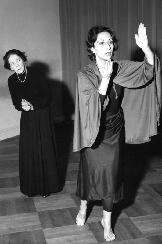 23.1.1959 West-Berlin Mary Wigman-Studio, Englische Meisterschülerin links: M. Wigman